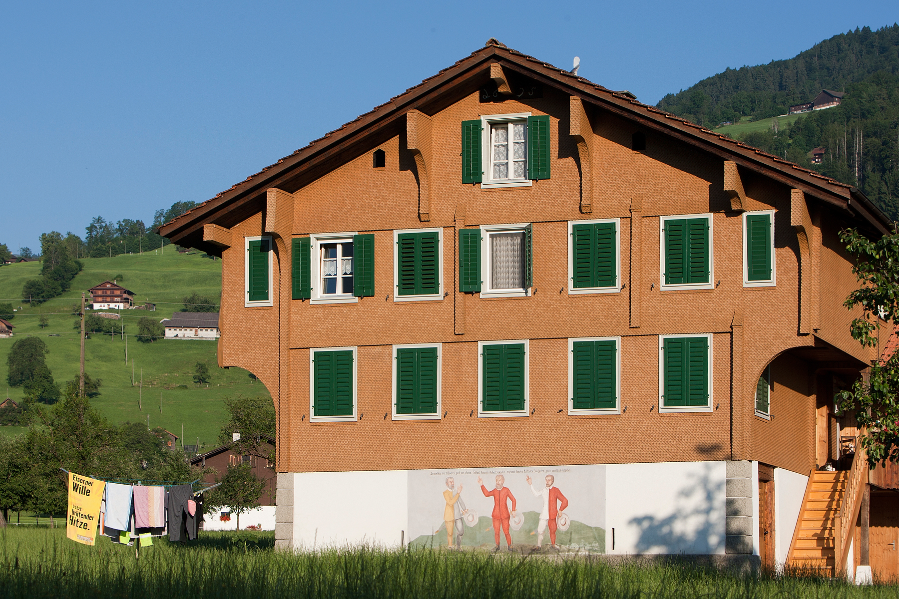 Haus im Feld, Grossteil, Giswil - Erbaut ca. 1620